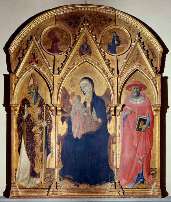 Pala dell'Osservanza Madonna col Bambino, Ambrogio e Girolamo.